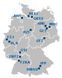 Lage der Helmholtz-Zentren in Deutschland